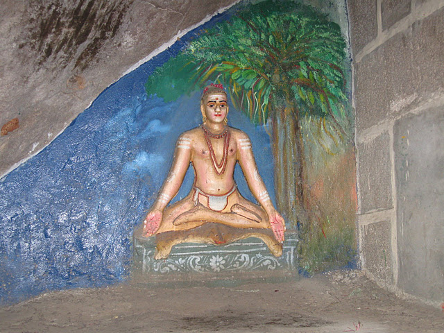 திருச்சியில் இருந்து தவ மேற்கொண்ட தாயுமானவ சுவாமிகளின் தவக்கோலப் படம்